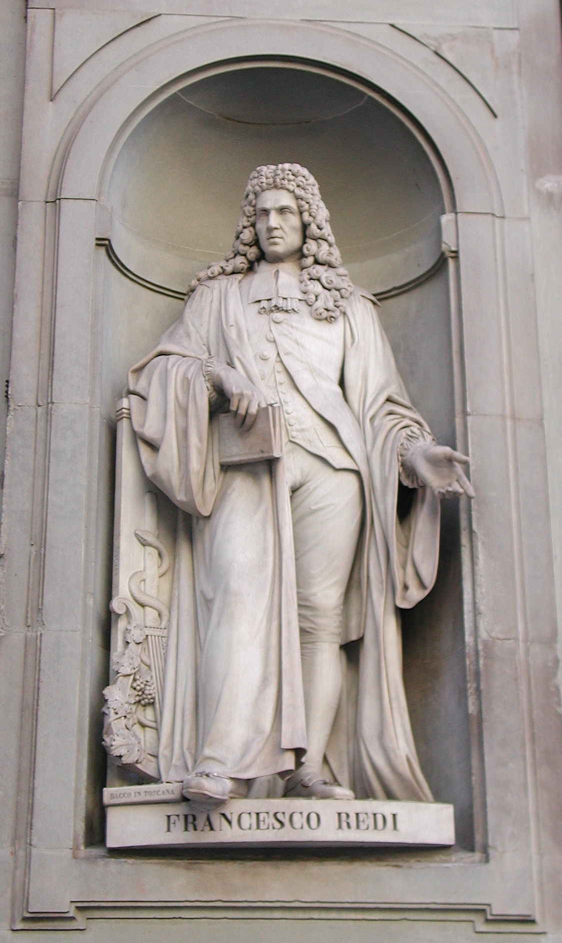 Statua di Francesco Redi (Arezzo, 18 febbraio 1626 - Pisa, 1 marzo 1697) fu medico, naturalista e letterato italiano.